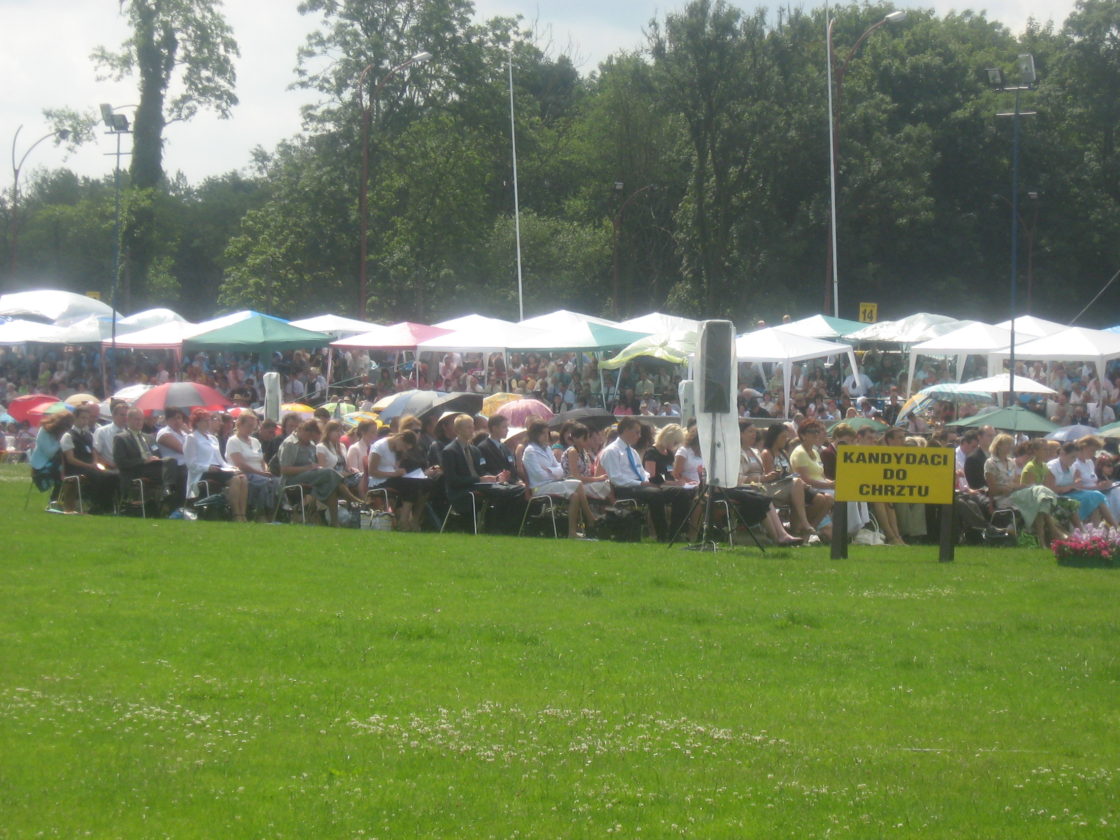 Kandydaci do chrztu. Zgromadzenie okręgowe w Szczecinie. 12 lipca 2008.